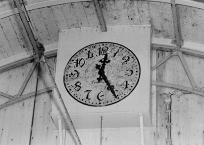 Linderoths ur gamla Hötorgshallen 1952